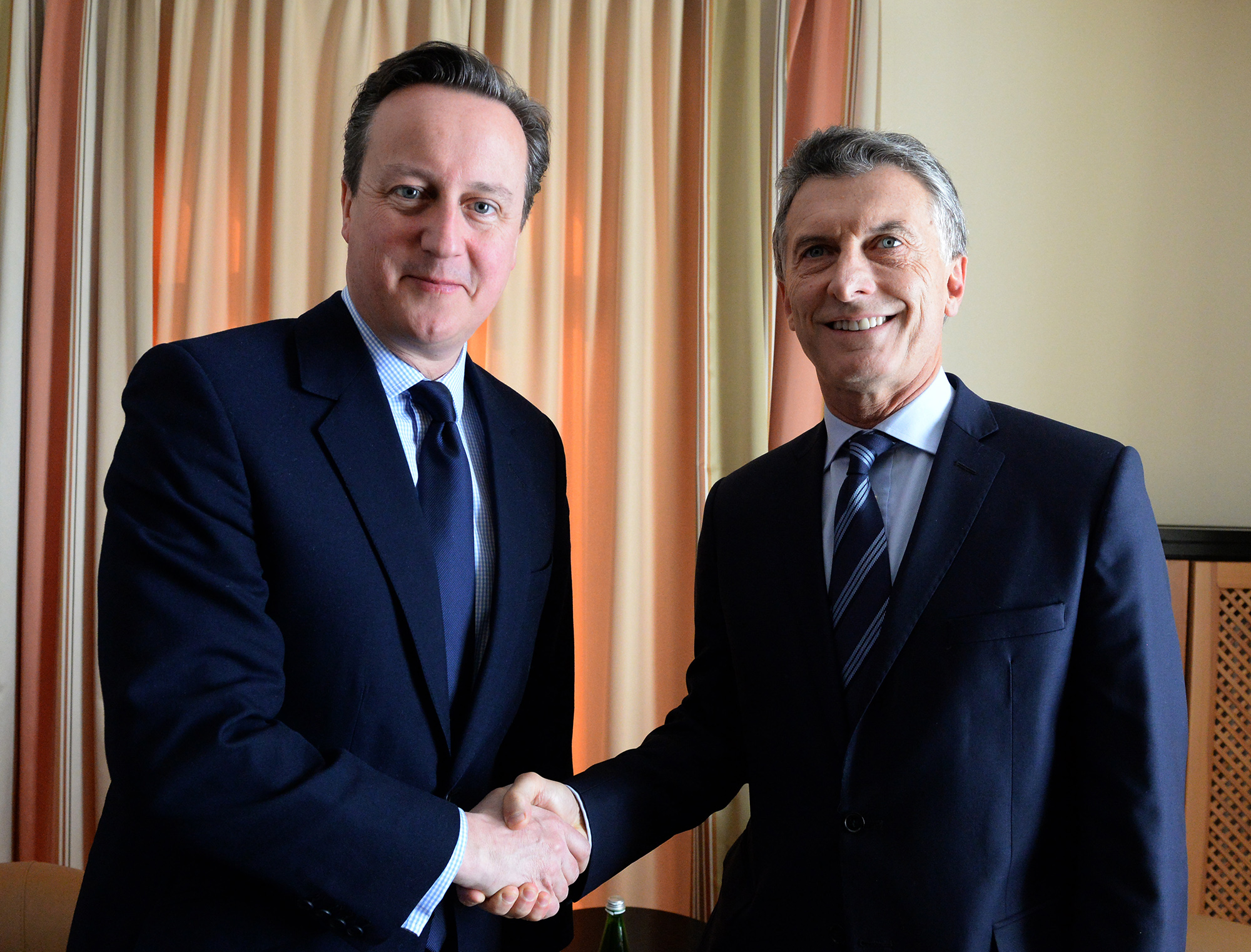 El presidente Mauricio Macri se reunió con el primer ministro británico, David Cameron, en el marco del Foro Económico Mundial que se realiza en la ciudad suiza de Davos.